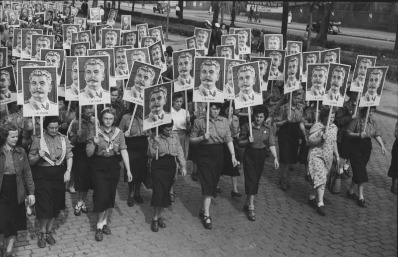 Illus-Martin 09.08.1951 Die große Demonstration am "Tag der jungen Mädchen" am 09.08.1951 zum Friedrichshain. Junge FDJlerinnen tragen das Portrtät des großen Stalin.